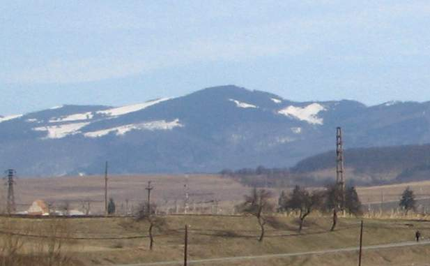 A Déli-Hargita legmagasabb pontja, a Kakukk-hegy (1558 m), Erdély